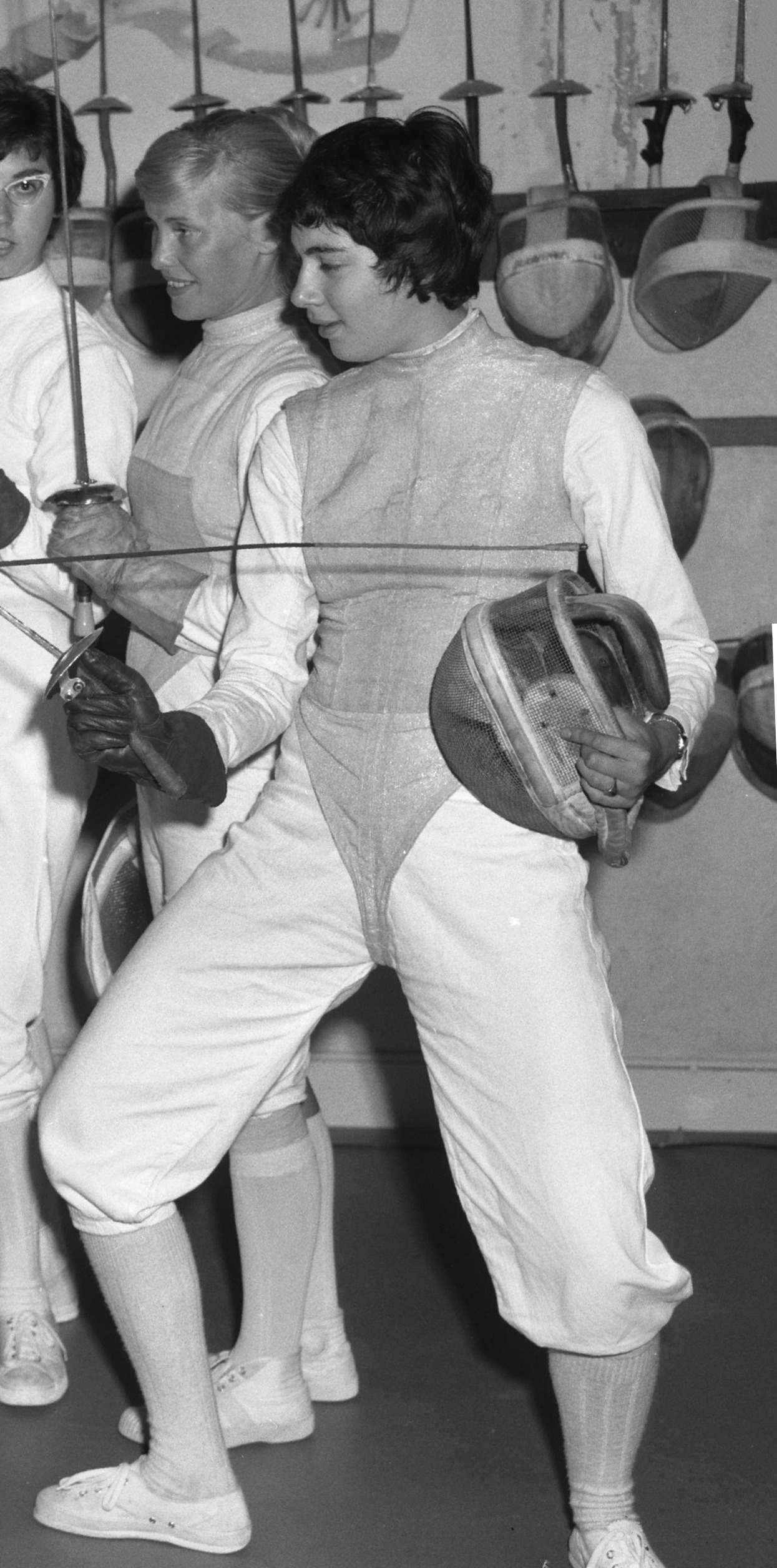 Nederlandse damesschermploeg voor de Olympische Spelen de schermzaal te Rotterdam, Botbijl